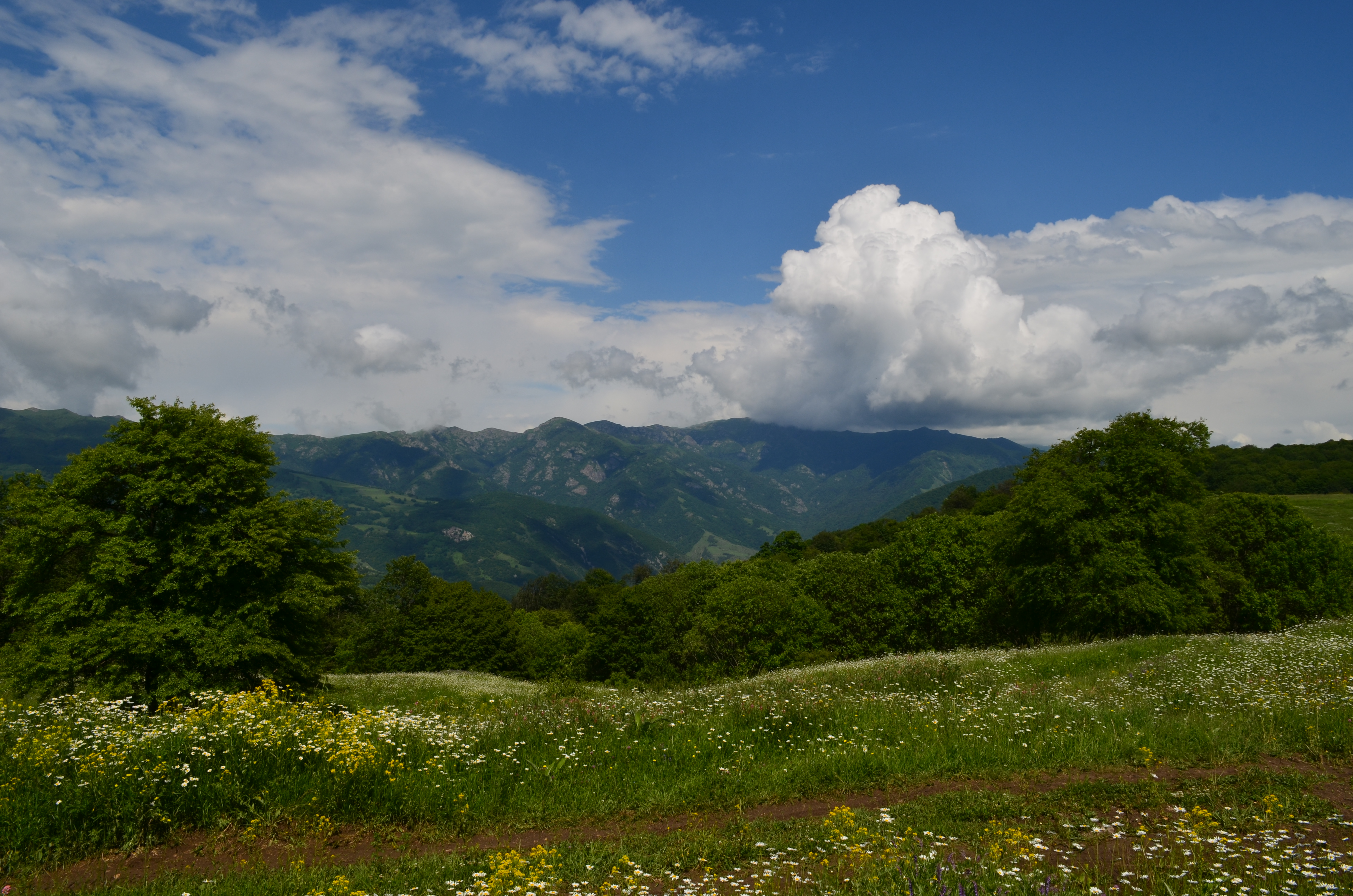 «Դիլիջան» ազգային պարկ